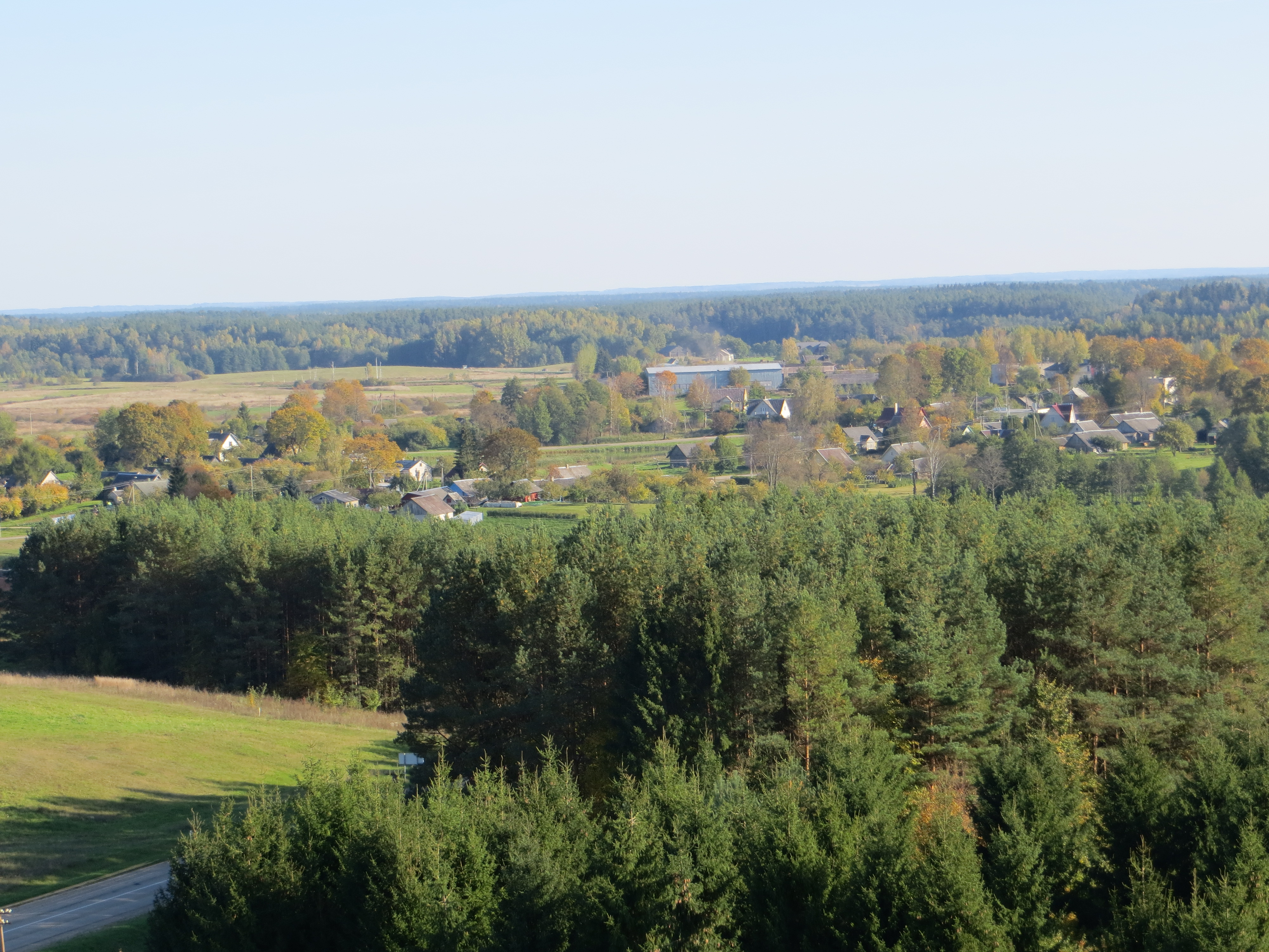 Linkmenys, Lithuania